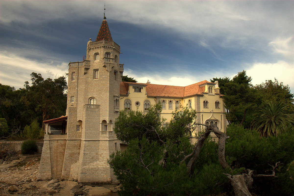 Palacio dos Duques de Palmela - Cascais